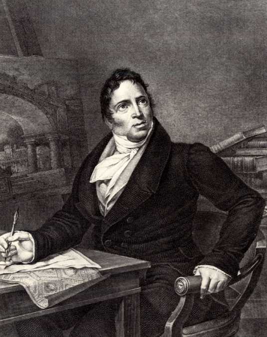 Ritratto di Antonio Basoli, incisione